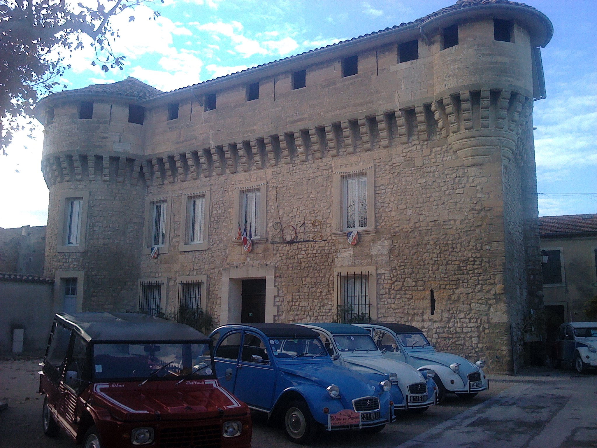 exposition de 2 cv à la mairie de Velleron (84)